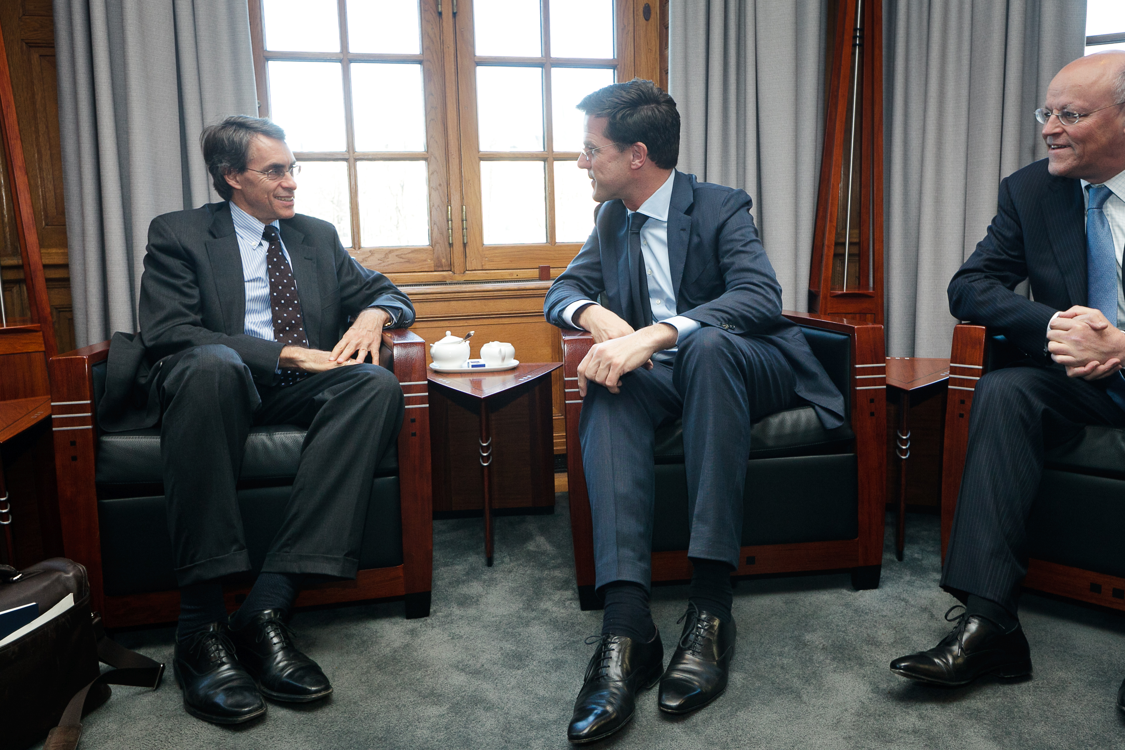 Kenneth Roth, executive director van Human Rights Watch, wordt door minister-president Rutte en minister Rosenthal verwelkomd in het Torentje. Tijdens de ontmoeting is onder meer gesproken over het HRW World Report 2012, het mensenrechtenbeleid in Nederland en de situatie in het Midden-Oosten. Mensenrechten gelden voor iedereen, altijd en overal. Dat is het uitgangspunt van het Nederlandse mensenrechtenbeleid. Lees hier meer over het Nederlandse mensenrechtenbeleid